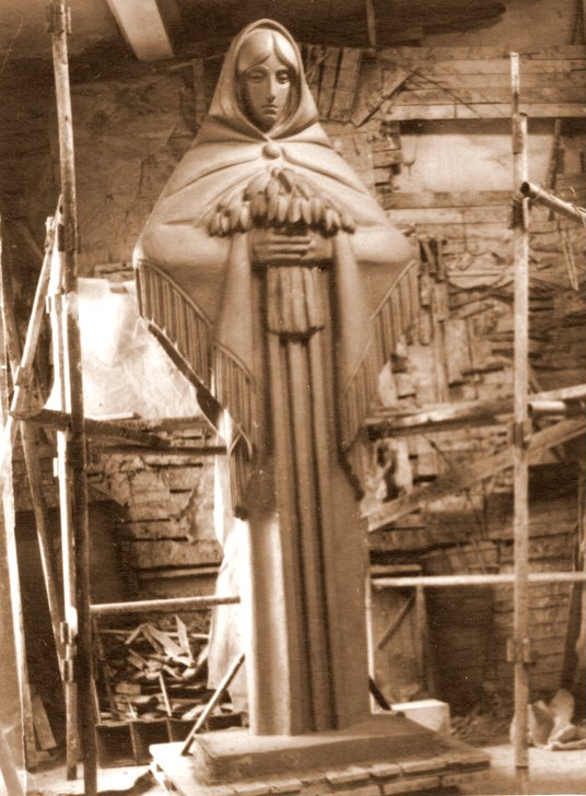 "Слава" скульптор Бринь Леонид Артемович